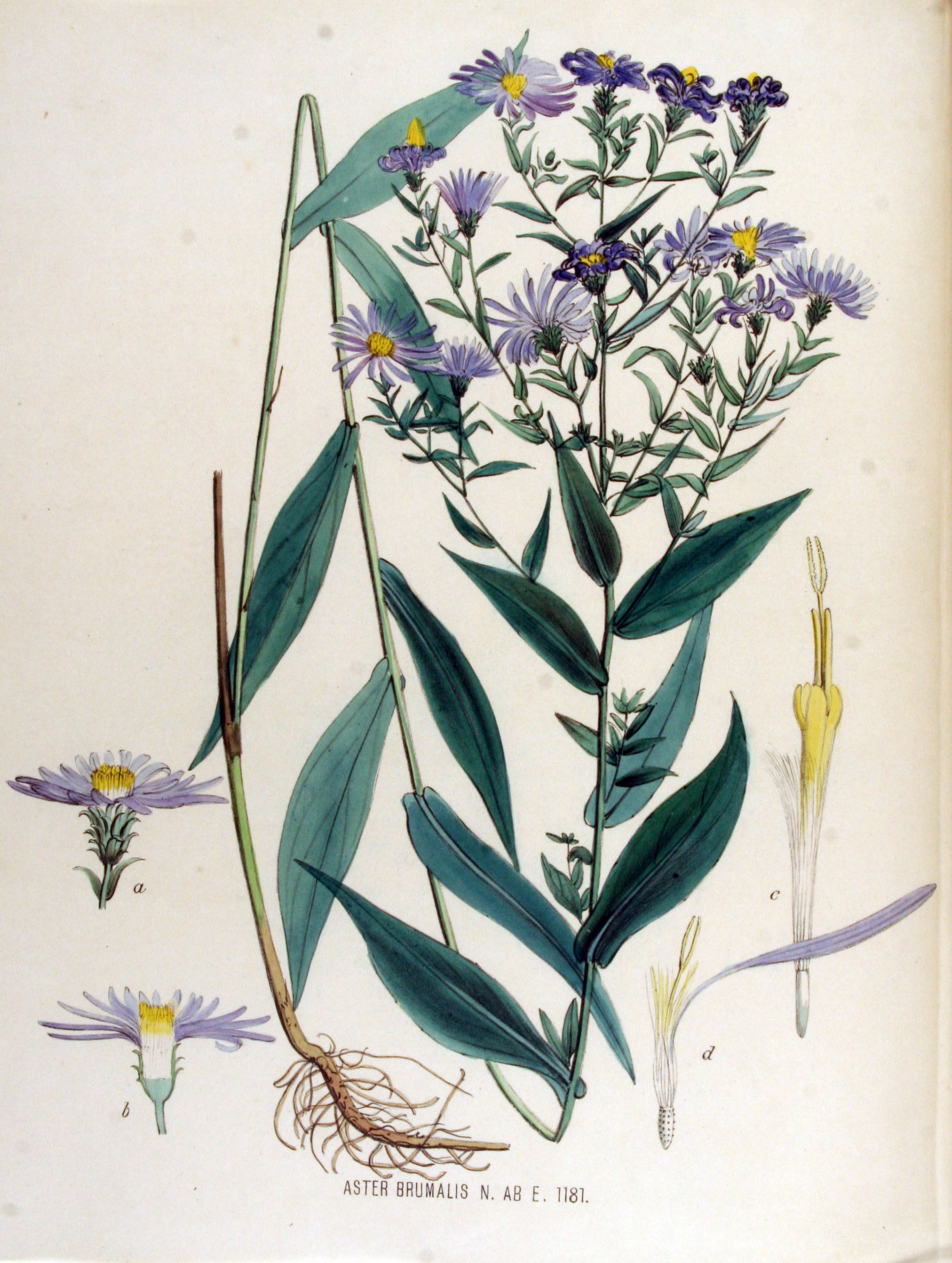 Legende: Ganze Pflanze. a Körbchen. b Körbchen, Längsschnitt. c Röhrenblüte. d Strahlenblüte.